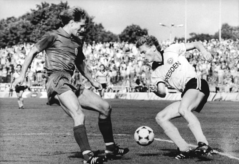 ADN-ZB-Häßler- -3.9.88-tre-Dresden-Fußball-Oberliga- Dynamo Dresden - Stahl Brandenburg 3:1- Uwe Jahnig (Dresden-rechts) sorgte für viel Druck aus dem Mittelfeld, hier im Zweikampf mit Jens Pahlke. 20 000 Zuschauer erlebten eine klaren Sieg der Dynamos.